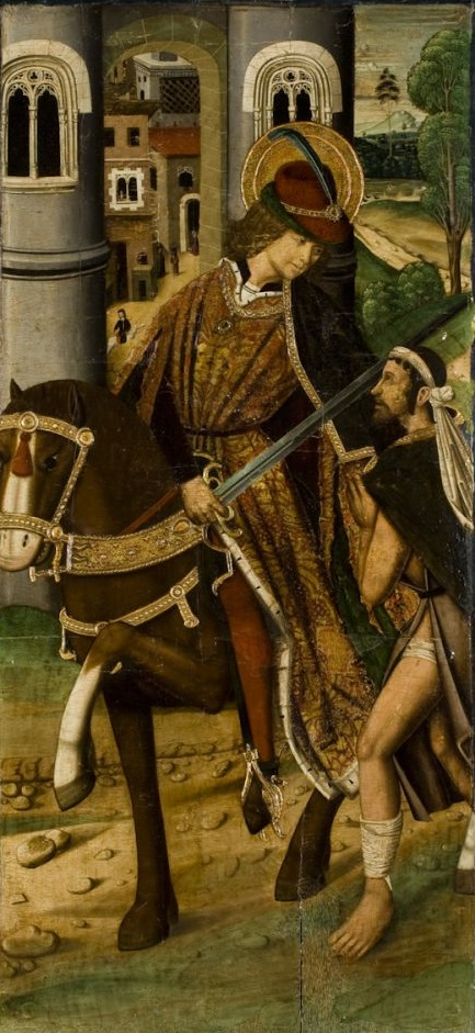 La obra muestra a San Martín de Tours repartiendo su capa con un pobre, y formó parte del retablo que Miguel de Ejea encargó en 1498 al pintor Miguel Ximénez para que adornara la capilla que aquél poseía en la iglesia de San Pablo de Zaragoza.